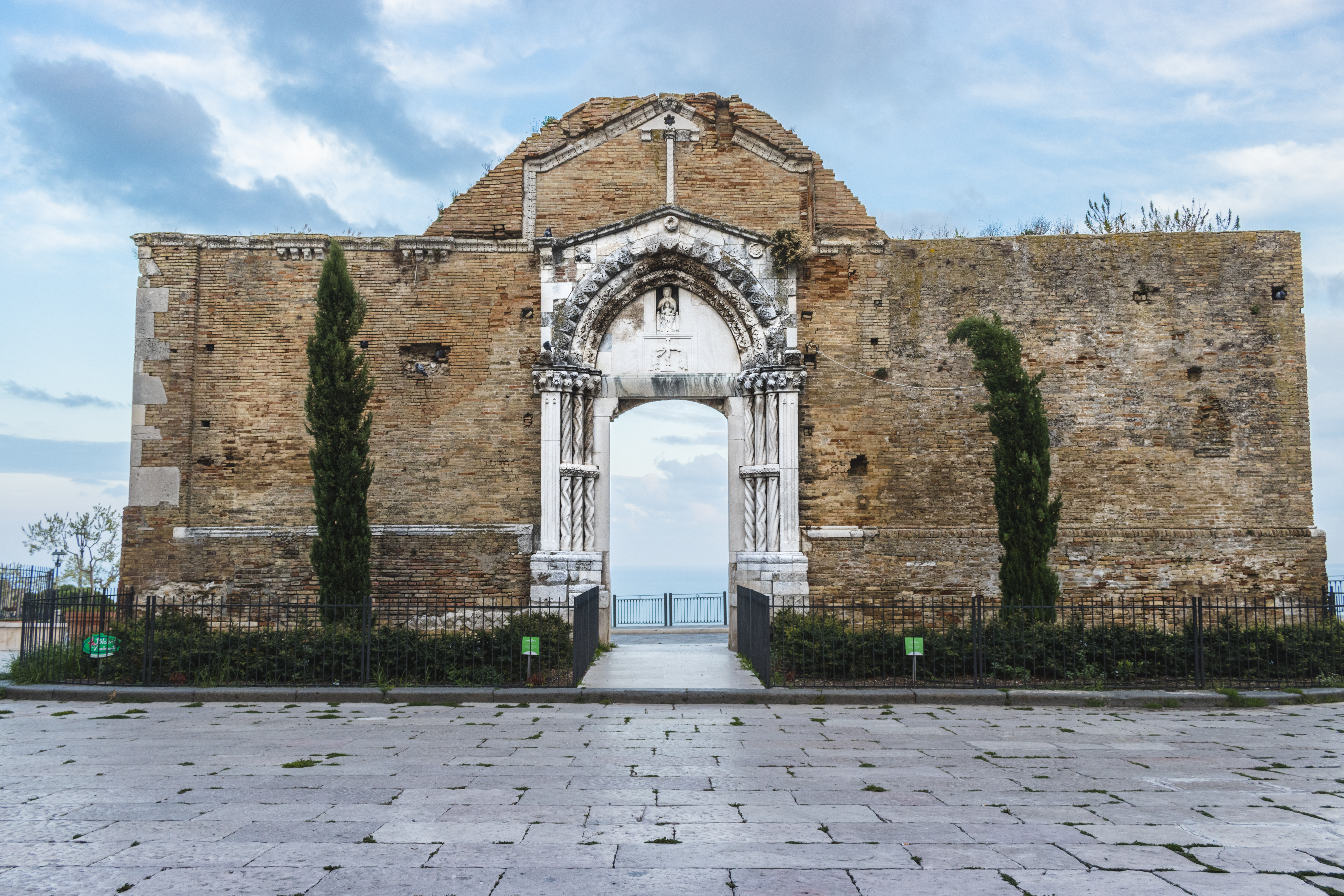 Vista frontale dell'unico muro rimasto in piedi della Chiesa di San Pietro, crollata a seguito della frana del 1956, presso la Passeggiata Archeologica This is a photo of a monument which is part of cultural heritage of Italy.